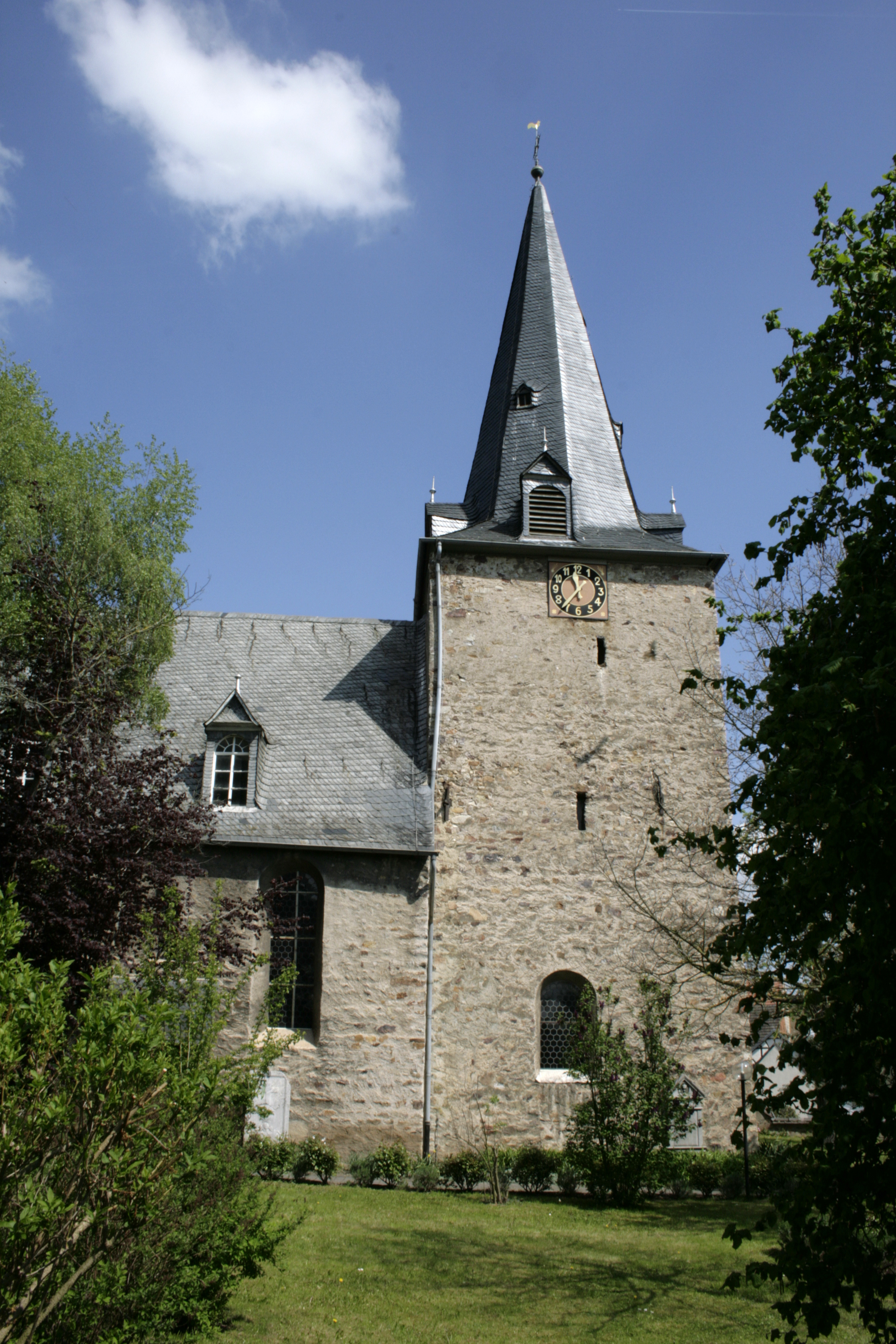 Kirche in Mensfelden, Deutschland, Südseite